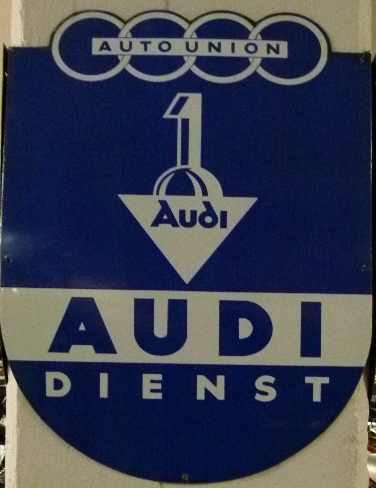 Originales Schild der Auto-Union: Audi Dienst